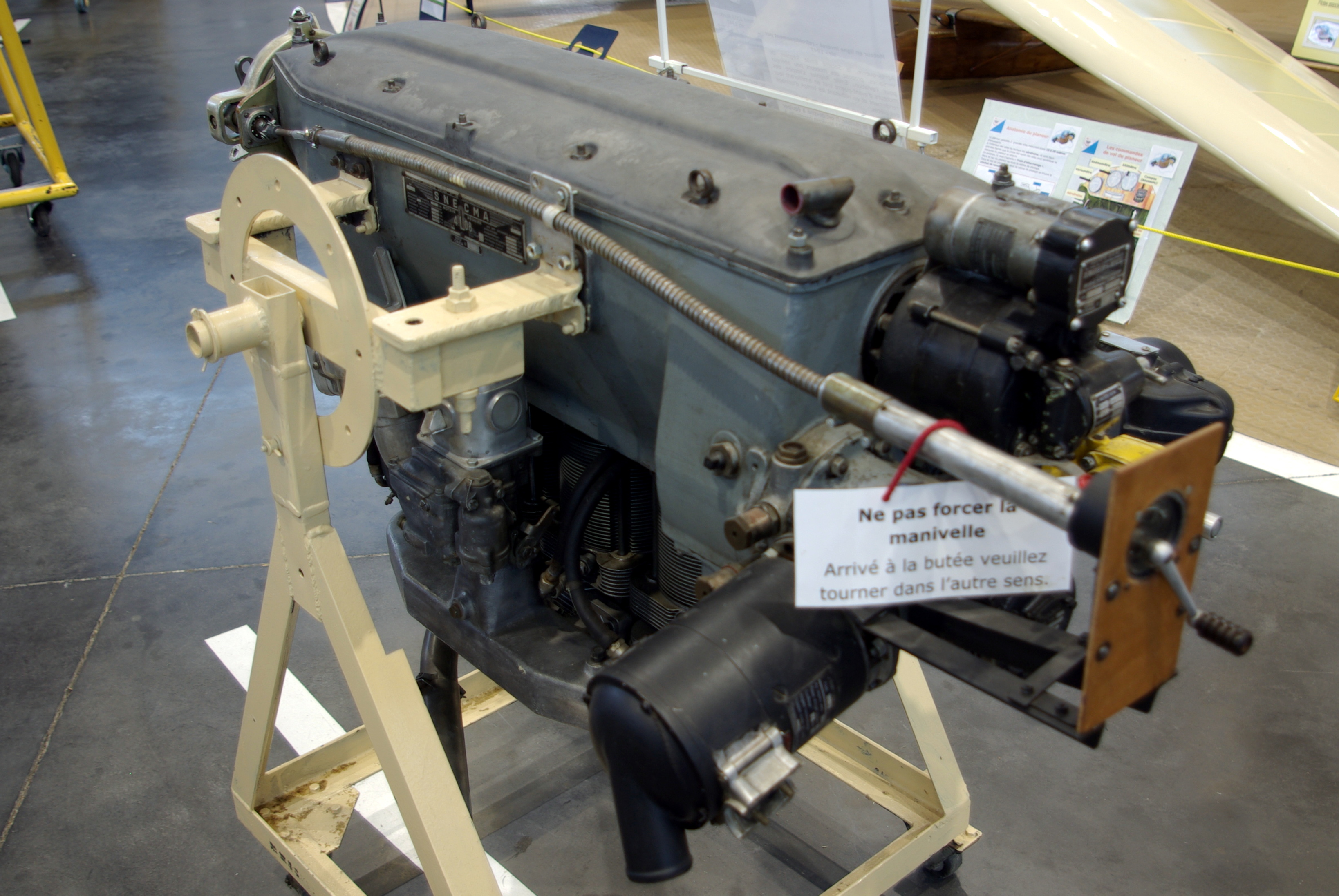 Moteur Snecma (Régnier) 4L08 au musée régional de l'air d'Angers-Marcé.